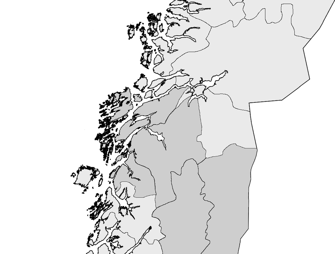 Vefsnmålet blir tala i dei gråe kommunane.